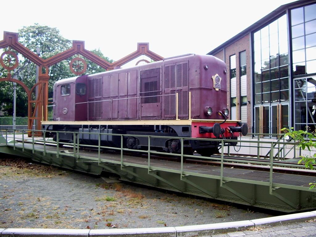 NS Loc 2498 op de draaischijf van het Nederlands Spoorwegmuseum, mei 2006. Licensing Categorie:Afbeelding Nederlands spoorwegmaterieel